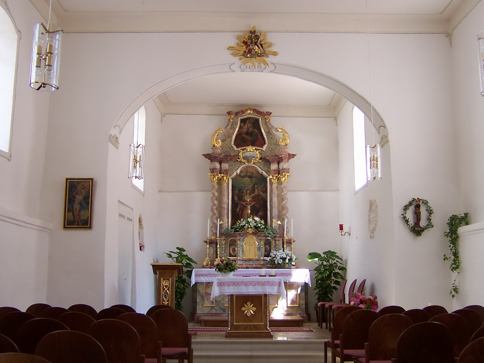 Ergoldsbach, Friedhofstraße 29. Katholische Kapelle St. Agatha. Im Kern mittelalterlicher Bau, 1726 barockisiert. Innenraum. Kirchenschiff mit zwei Fensterachsen. Flachdecke in Chor und Langhaus. Chorbogen stichbogig.